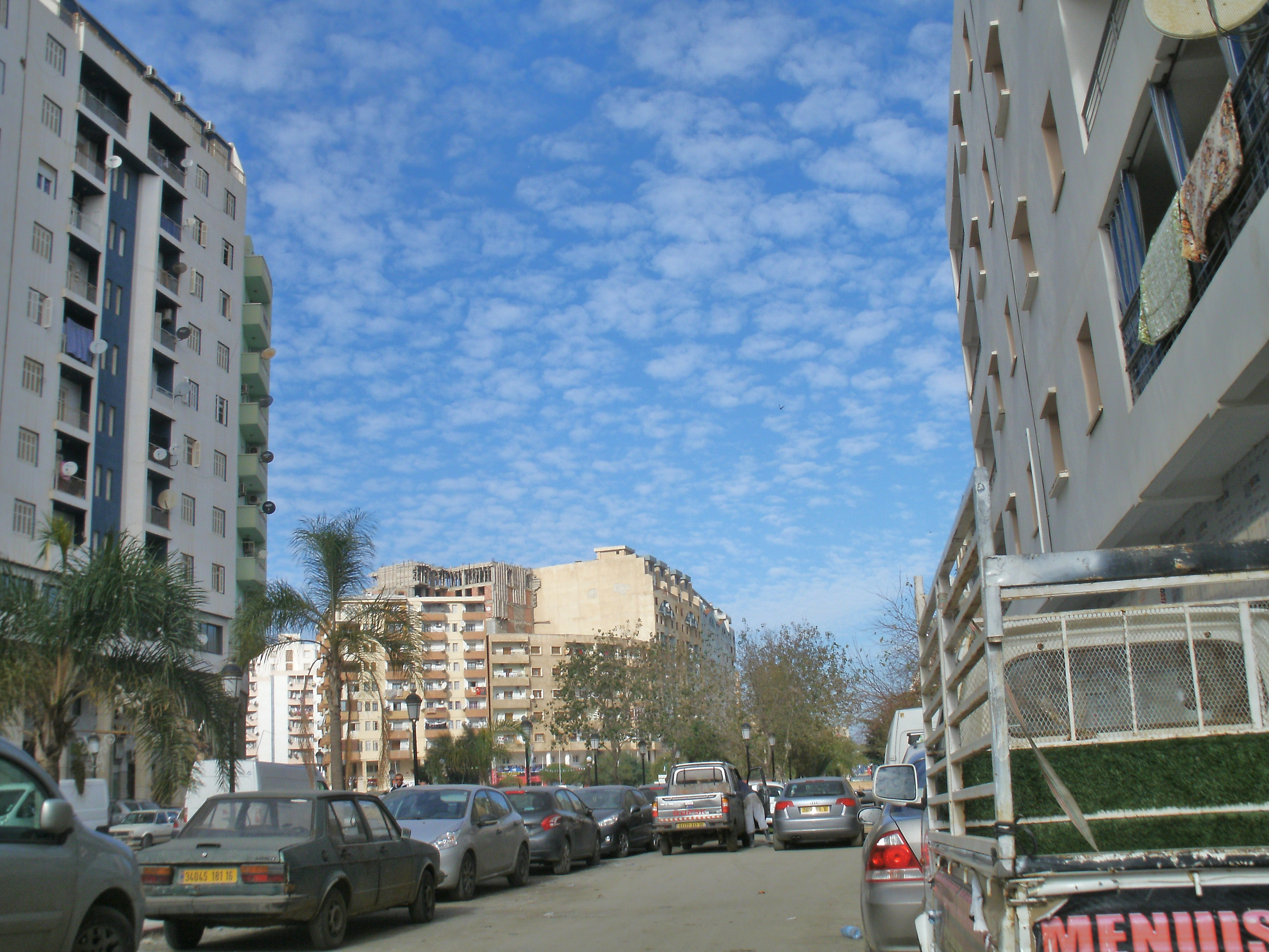 Près du centre de Boumerdès